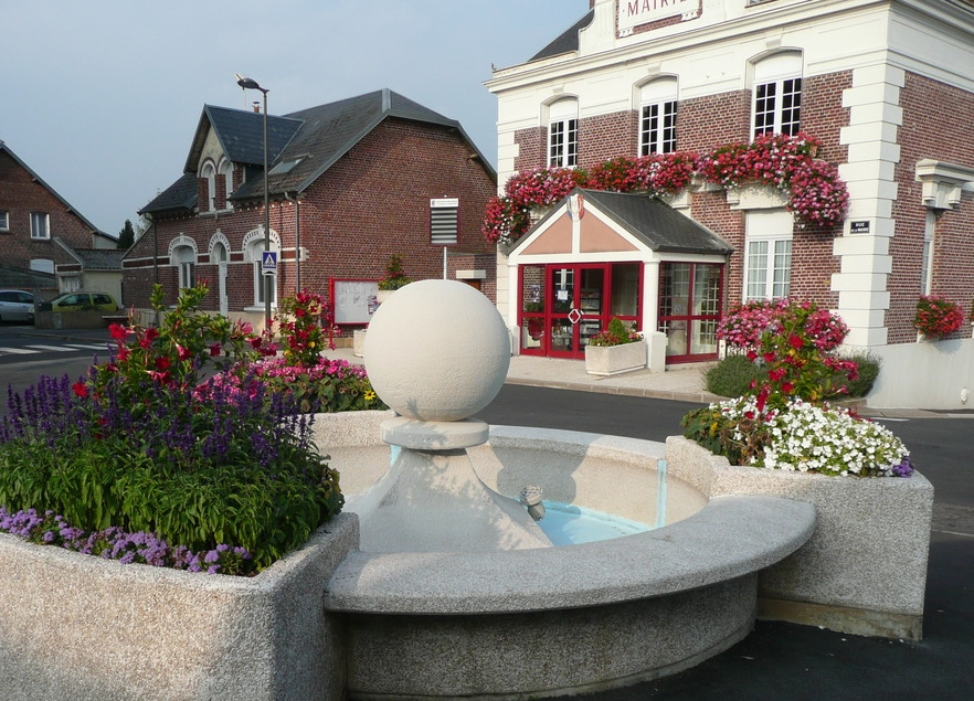 Mairie d'Itancourt fleurie et sa fontaine.